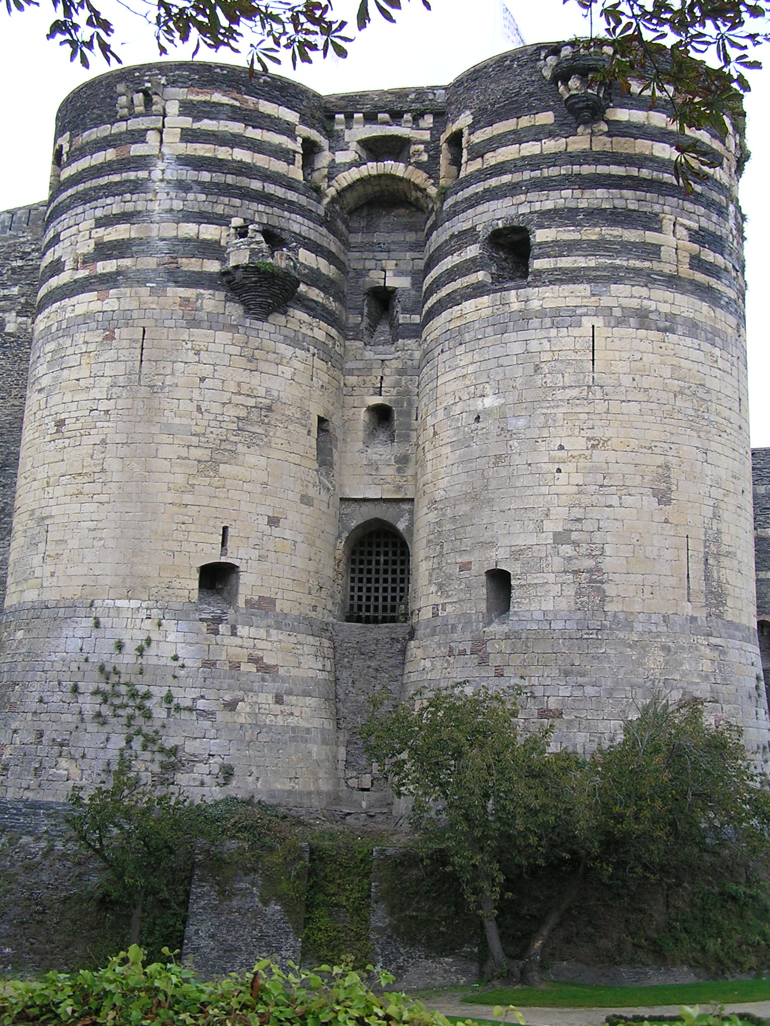 ancienne porte du château d'Angers